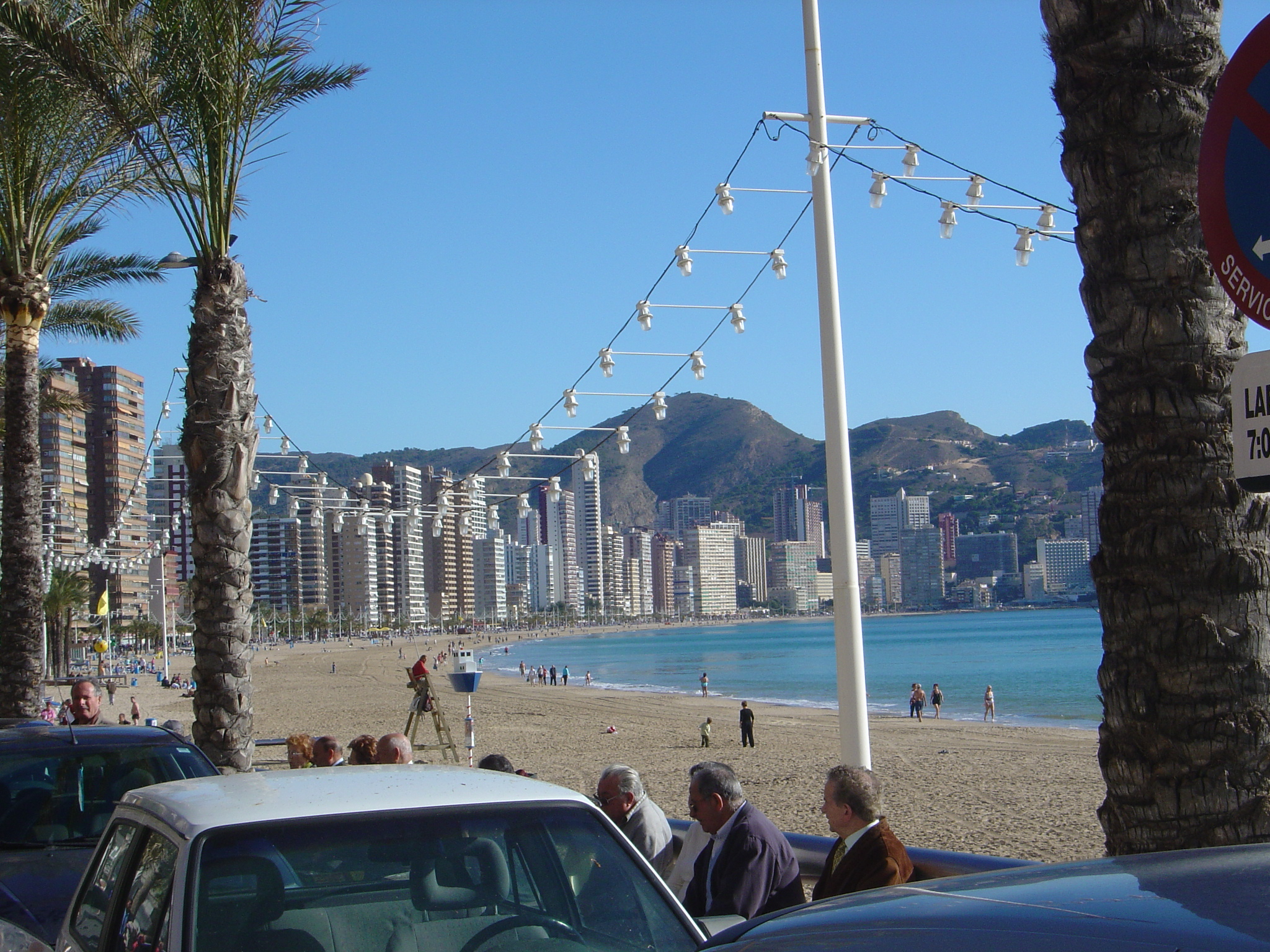 Vista del paseo marítimo y de los rascacielos de Benidorm (España). Fotografía por comakut.